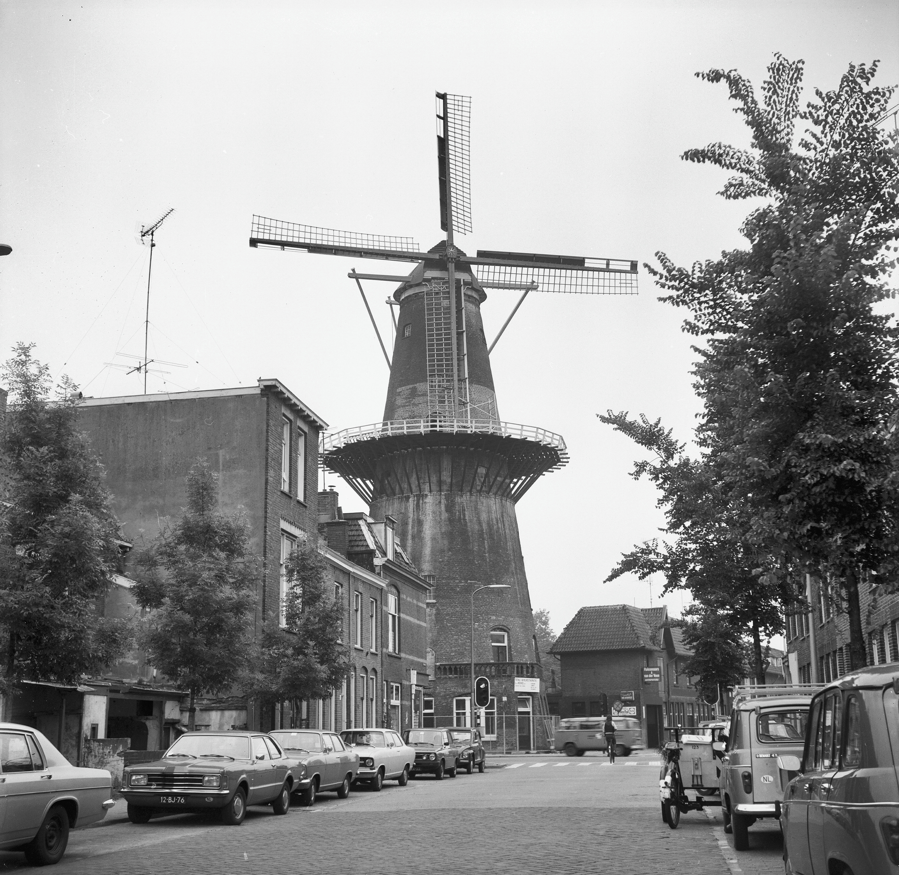 korenmolen "Rijn en Son", overzicht